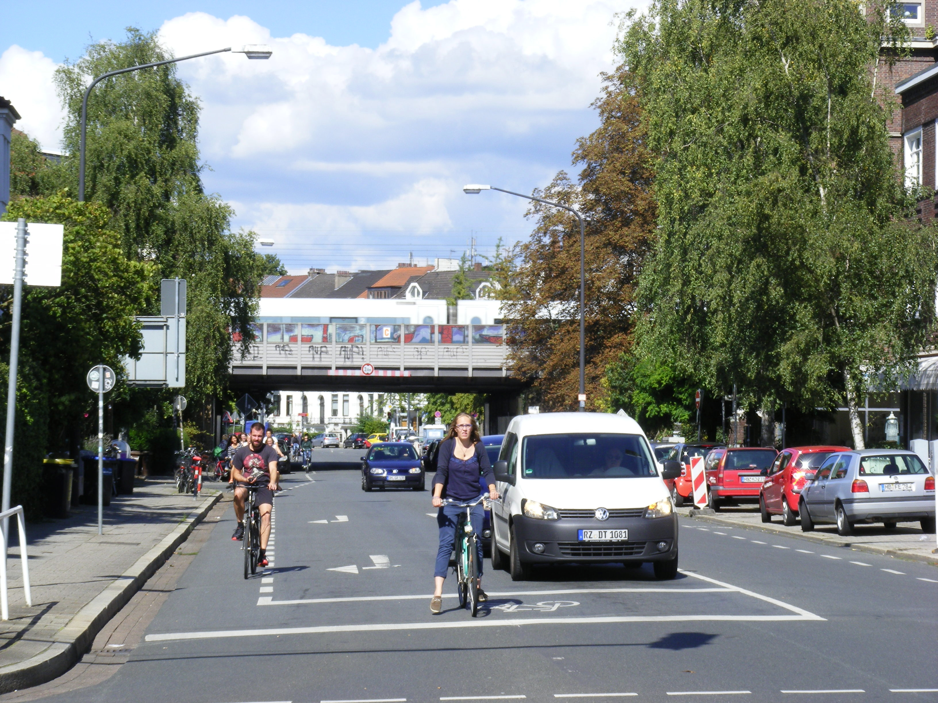 Schutzstreifen und Fahrradaufstellfläche, Bremen, Graf-Moltke-Straße Ecke Bismarckstraße